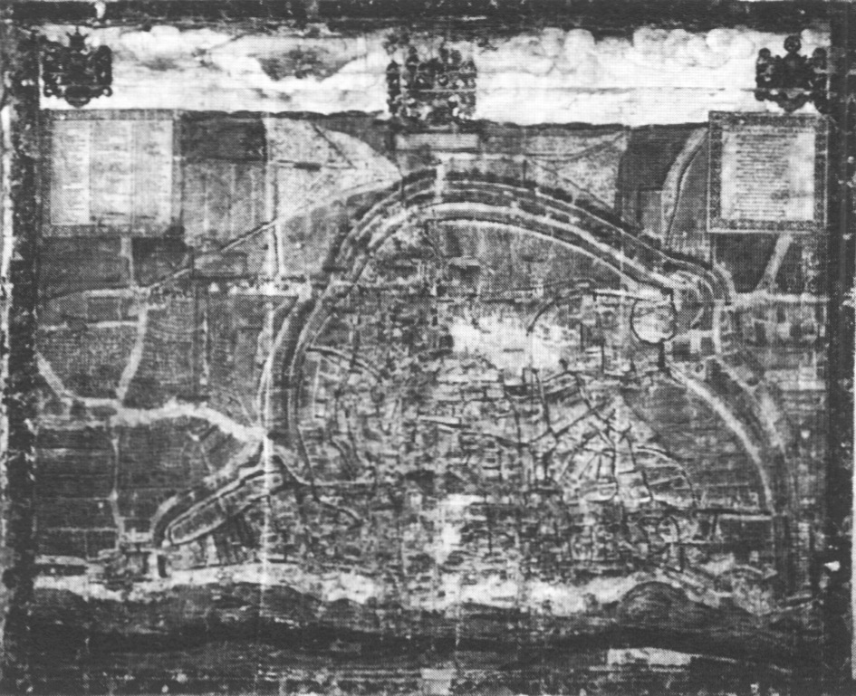 Stadtplan von Mainz, 95,5 × 112 cm, Staatsarchiv Würzburg, Mainzer Risse und Pläne 162. Überschrift: Abmessung der Stadt Mainz und der dazu gehörigen Güter, 1575 auf Laurenzitag. Gezeichnet von Gottfried Maskop und zugeeignet dem Kurfürsten Daniel Brendel von Homburg.